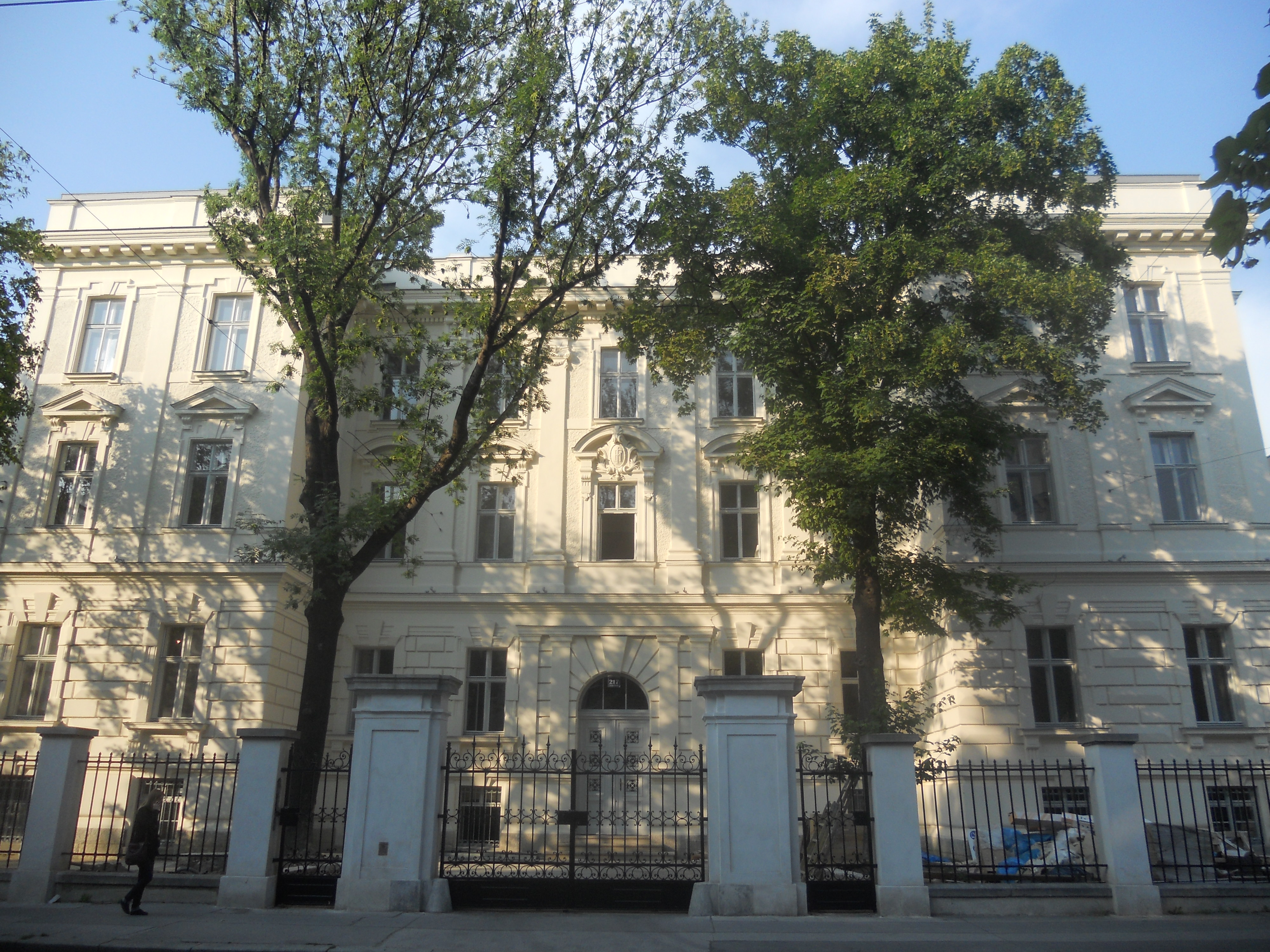 Das ehemalige Offizierswohnhaus der Wilhelmskaserne, Vorgartenstraße 217 in Wien